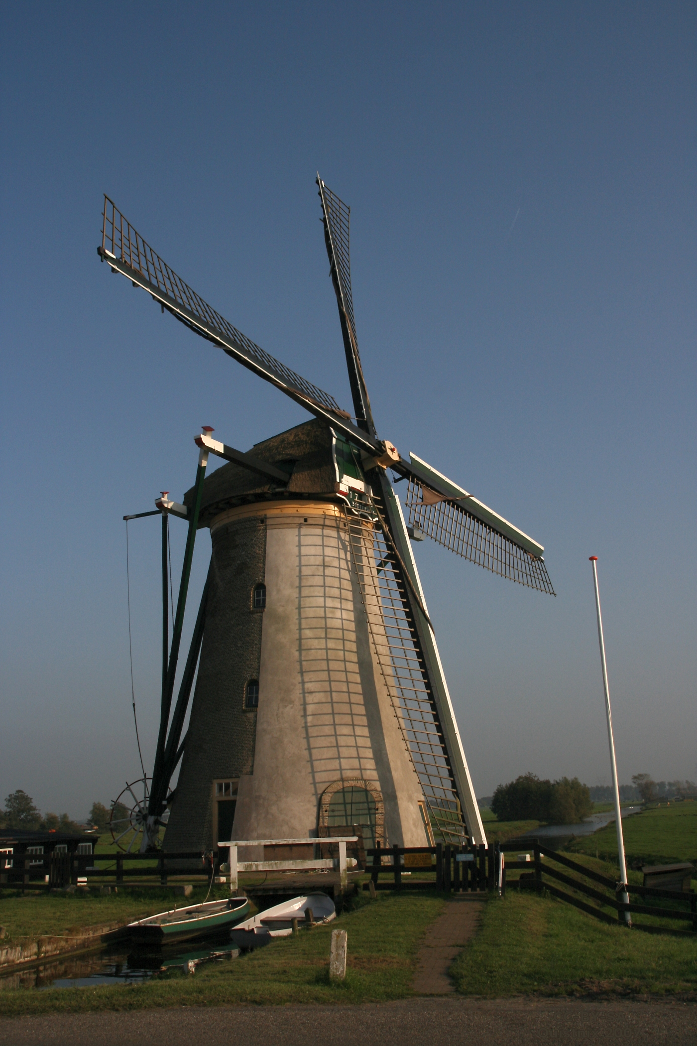 Warmond: Booterhuismolen